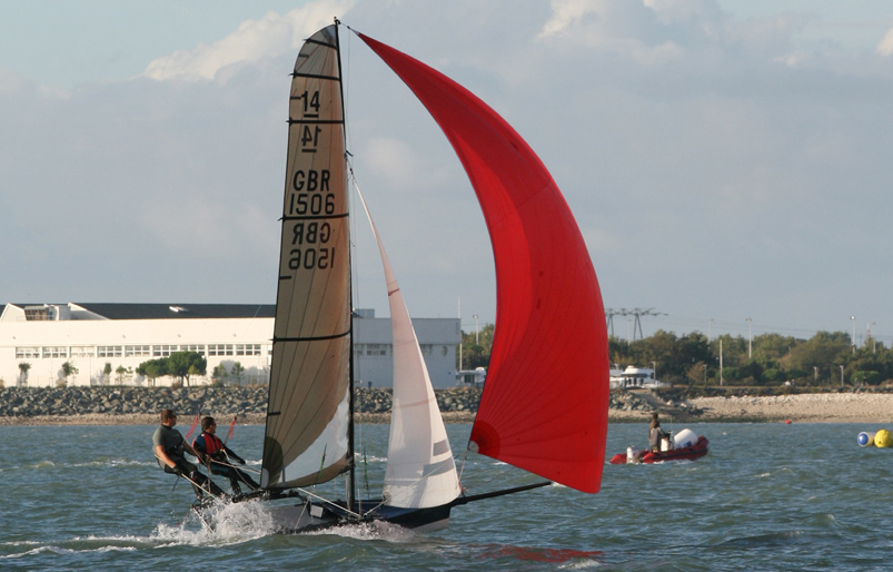 14 foot skiff dans la baie de La Rochelle.